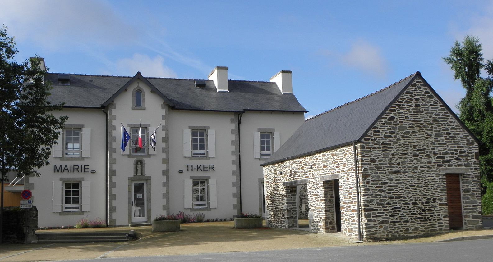 Mairie de Kergloff (29).